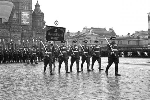 Sfilata degli ufficiali del 2° Fronte Ucraino alla parata della vittoria a Mosca il 24 giugno 1945